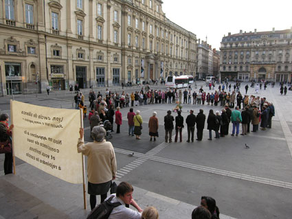 « Cercle de silence » à Lyon, place des Terreaux, devant l'hôtel de ville en avril 2009.